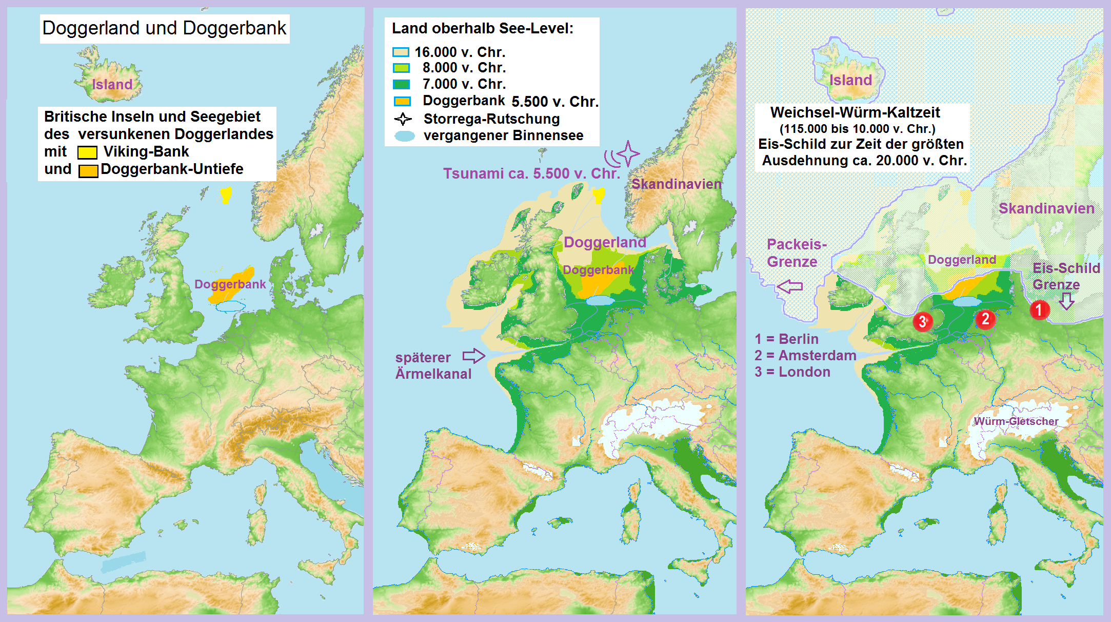 Landbrücke zwischen Festland und Britannien – Doggerland und Doggerbank. Vergleich der geographischen Situation im Jahre 2.000 zu den späten Jahren der Weichsel-Würm-Eiszeit